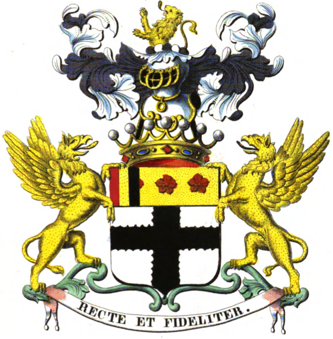 Armoiries de la famille Jolly